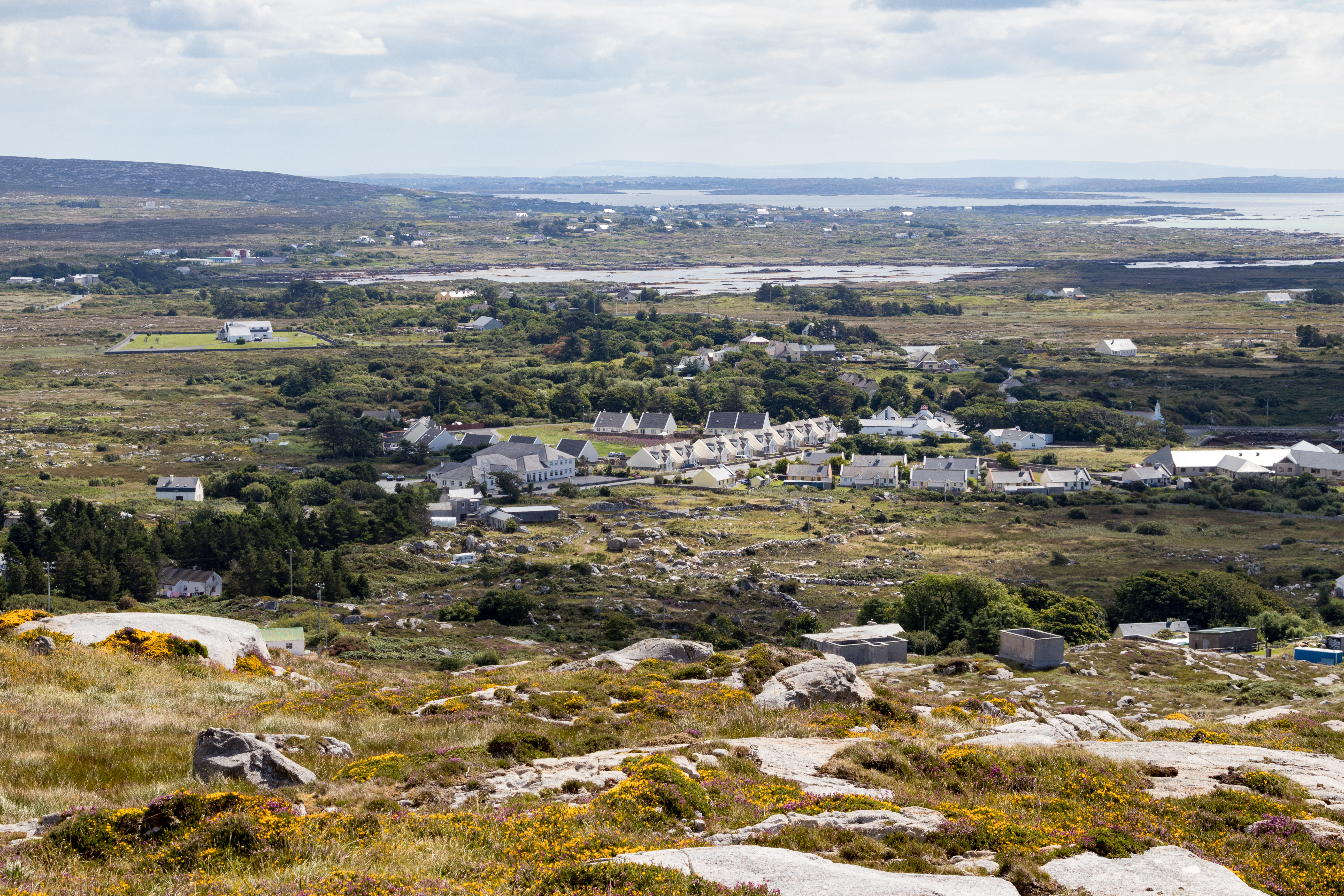 Carna, Co. Galway, gesehen vom Culeen An Coilin